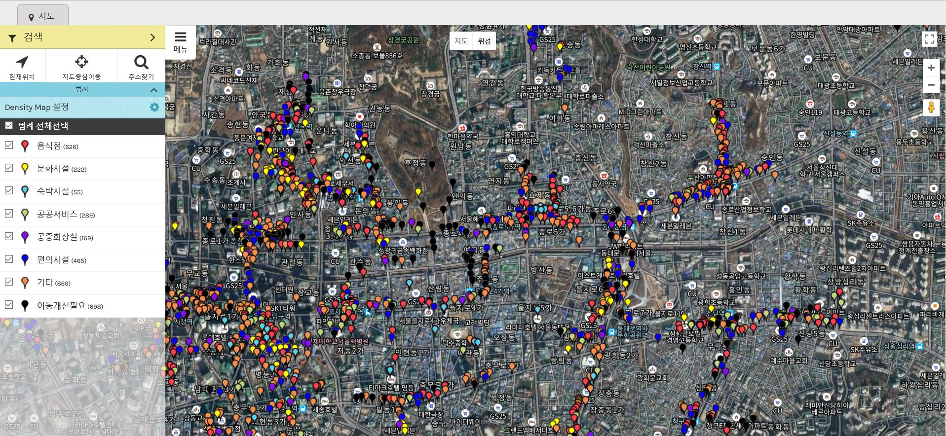 장벽없는 세상 오프맵의 화면스크린샷 사이트 주소 :(